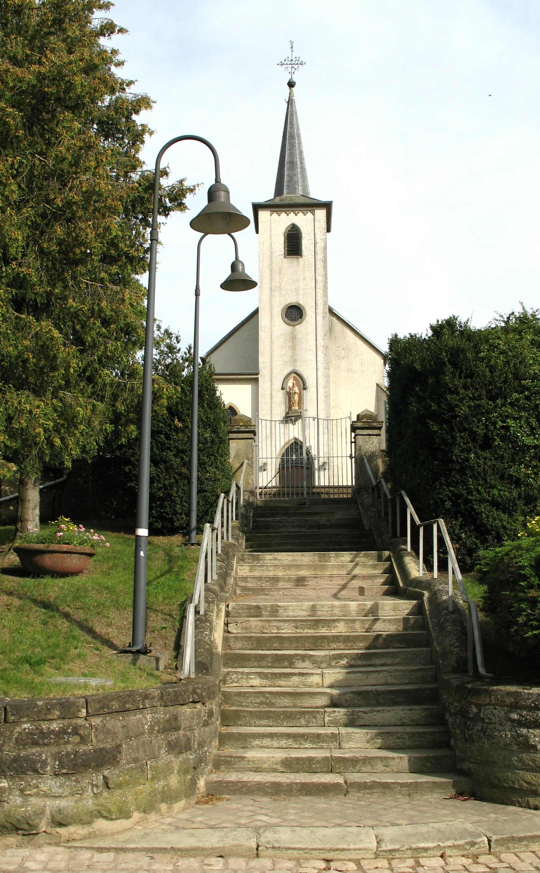 Kierch vu Wecker